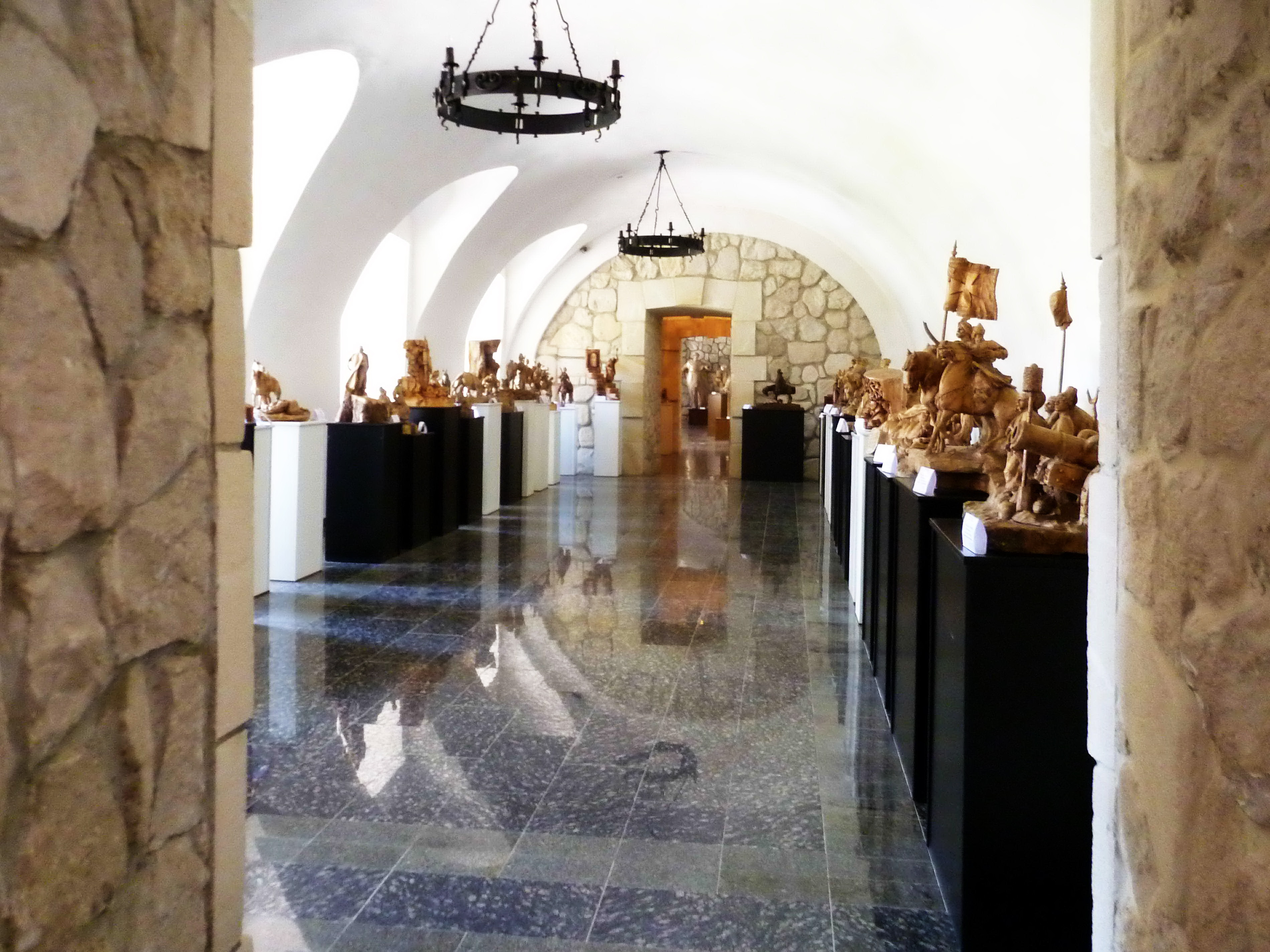 Замок (1631 р.) - виставка дерев'яної скульптури - м.Збараж (вул. Морозенка, 38) Тернопільська область Україна